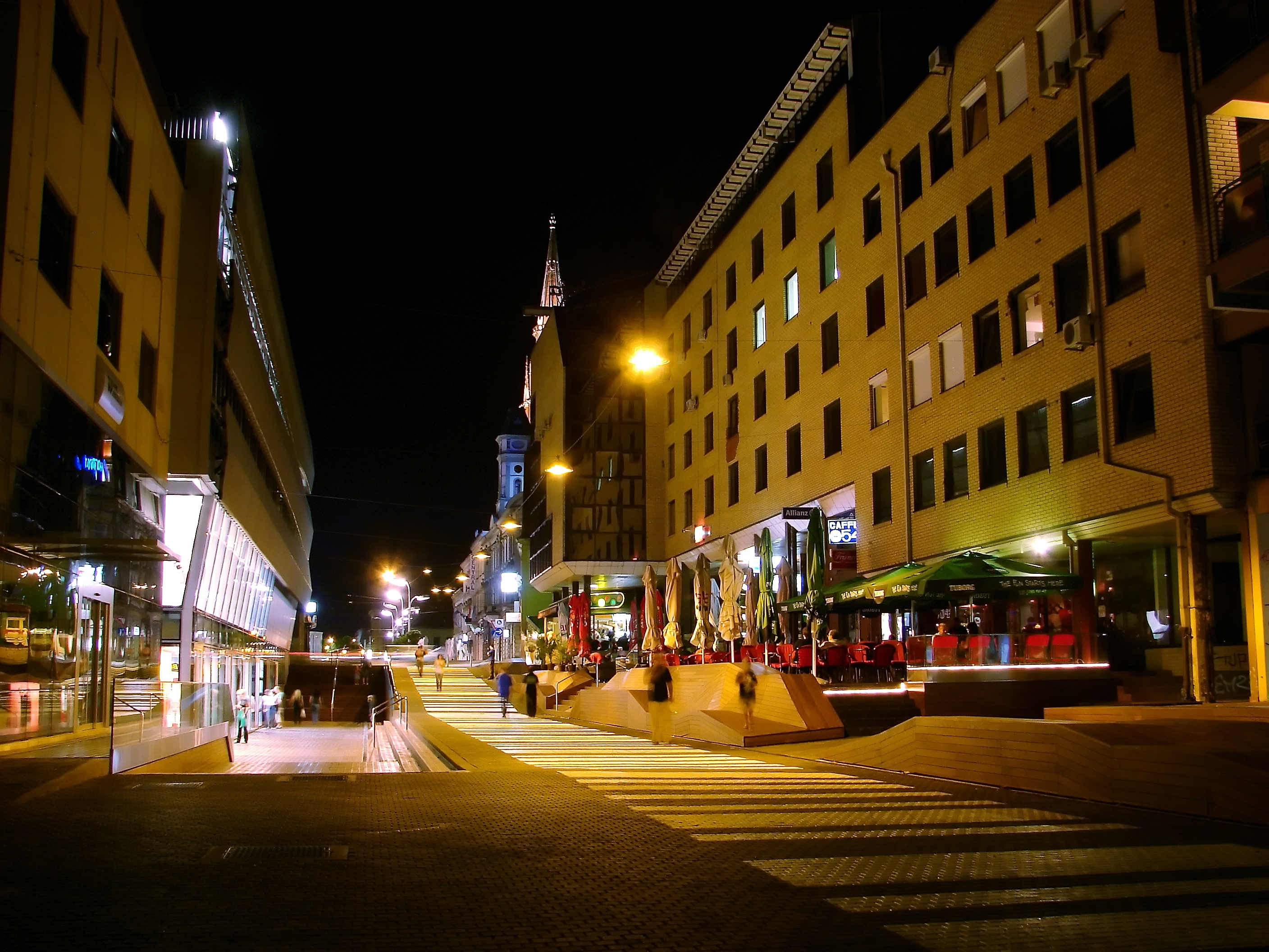 Osijek - kod PetraPana i Esseker centra